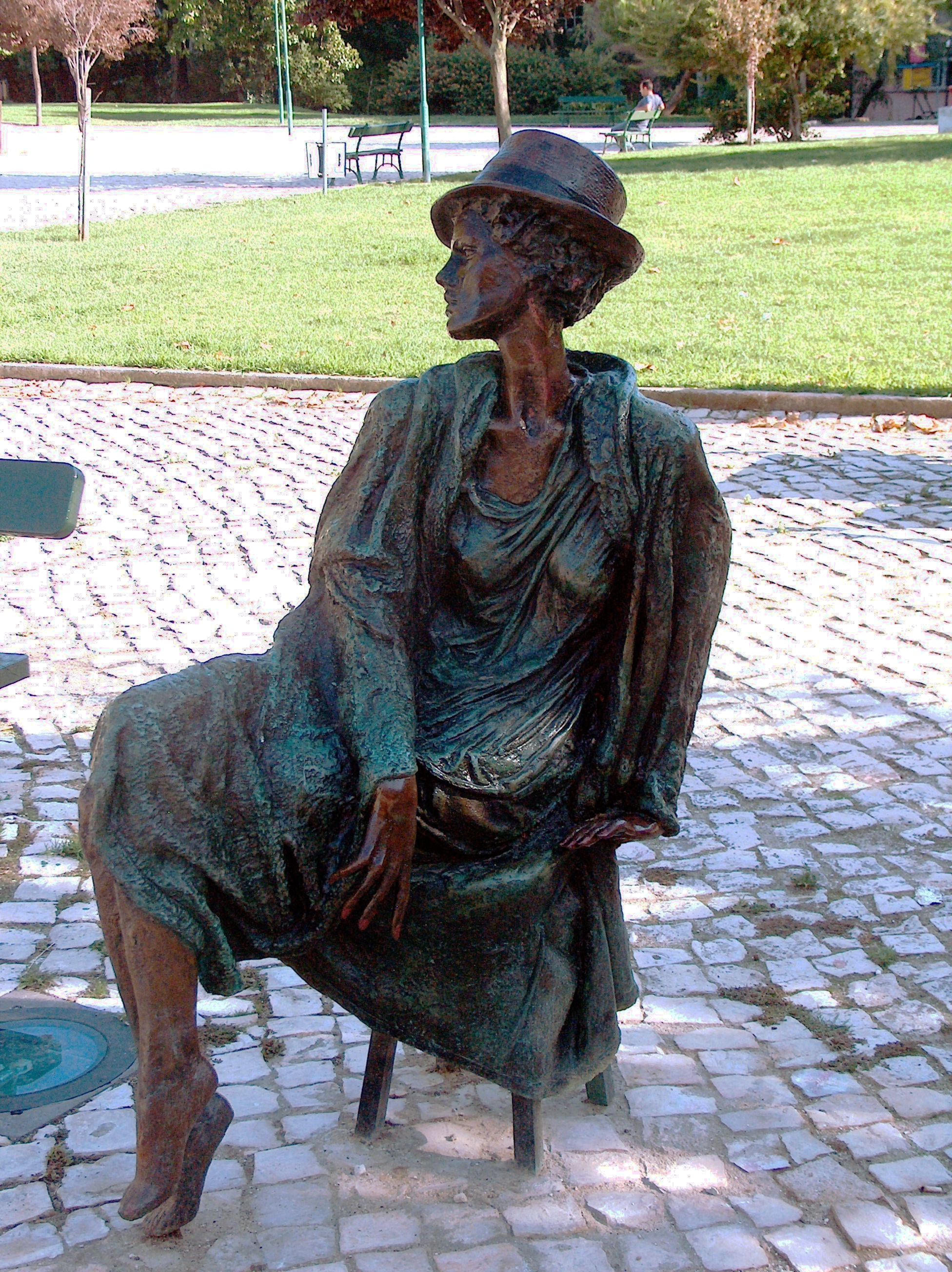 Jorge Melício. Escultura do conjunto A Família, Jardim Fernando Pessa Lisboa, Portugal.